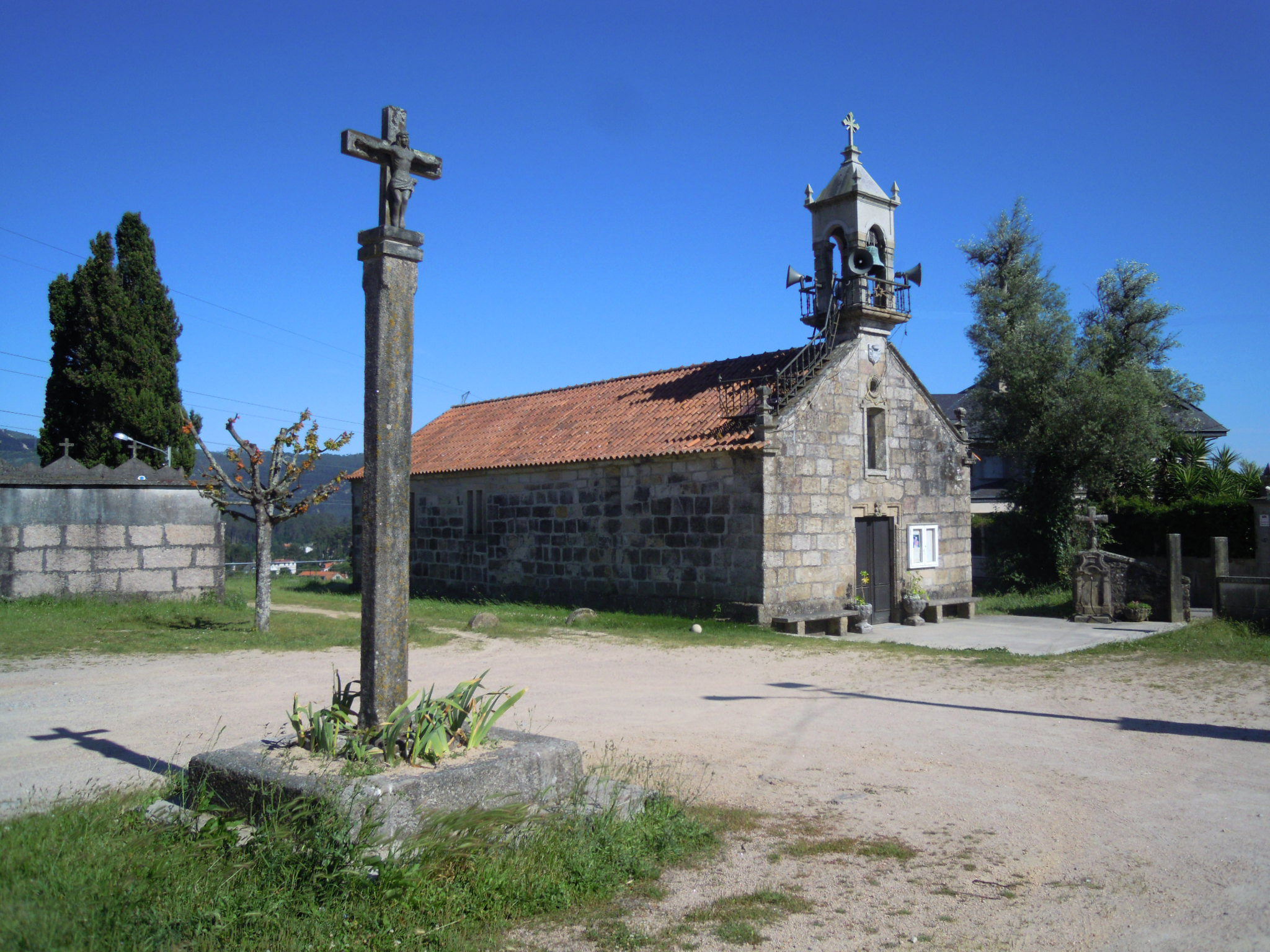 Igrexa parroquial de Dornelas (Mos)